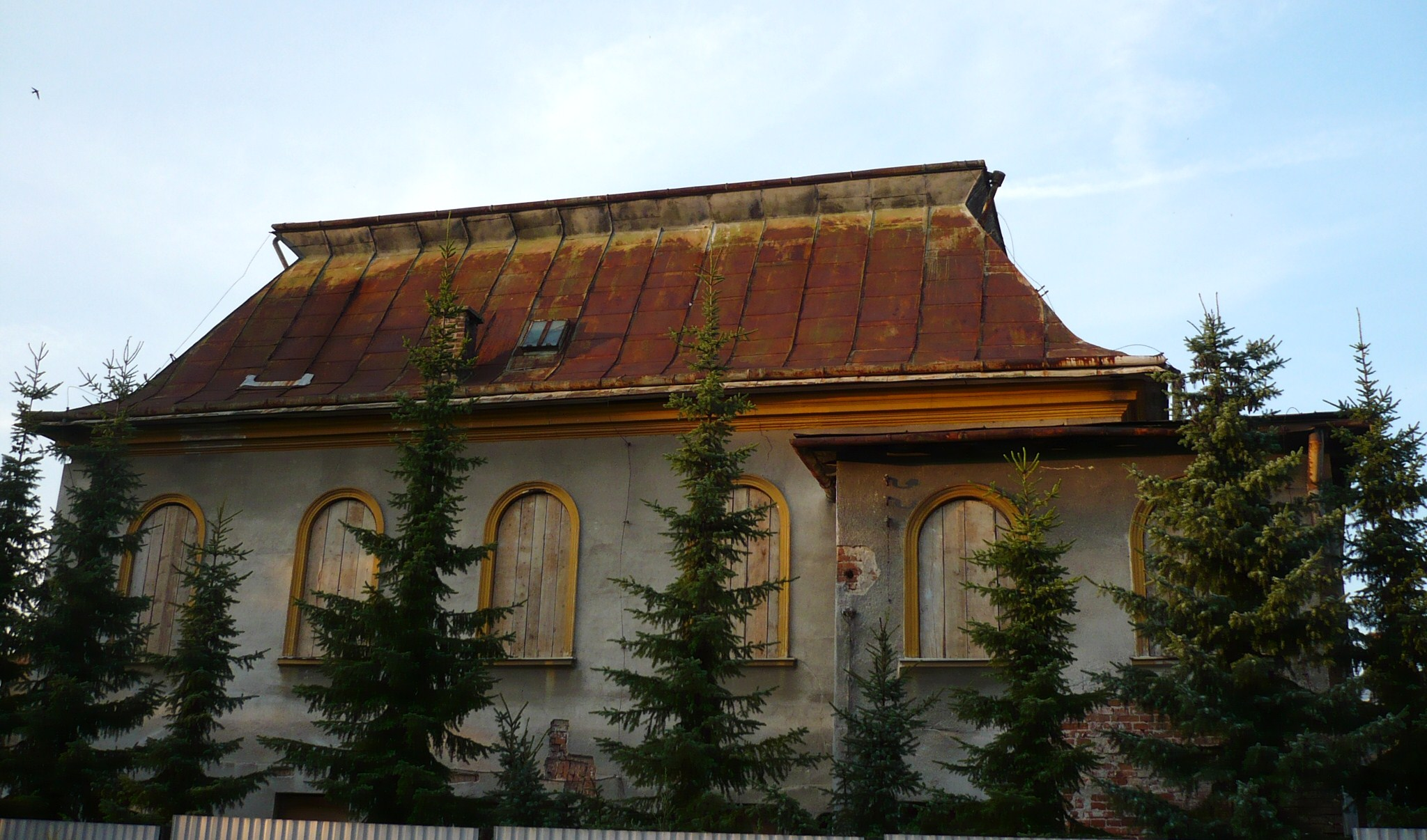 Przemyśl, Synagoga Zasańska